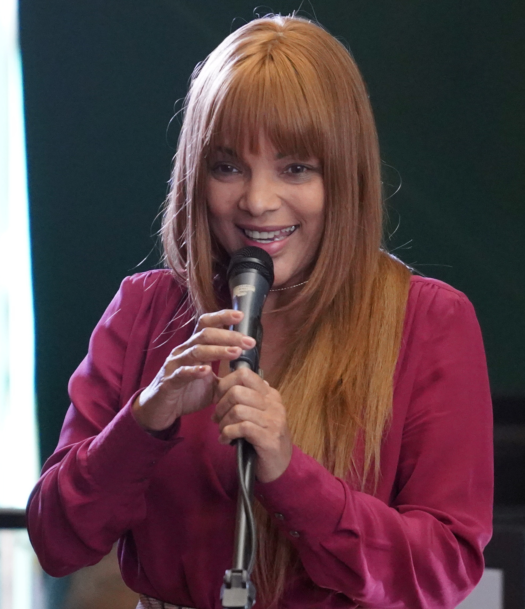 Flordelis em março de 2019.